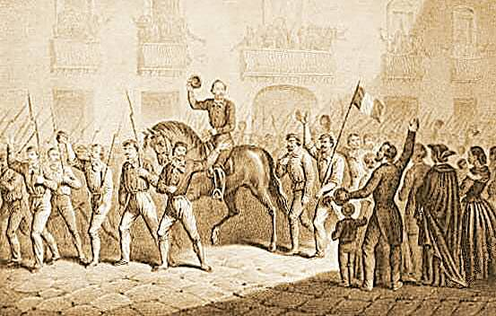 Ingresso in Palermo del generale Giacomo Medici e della sua colonna di volontari, nel 1860, ridotto, ritoccato, litografia